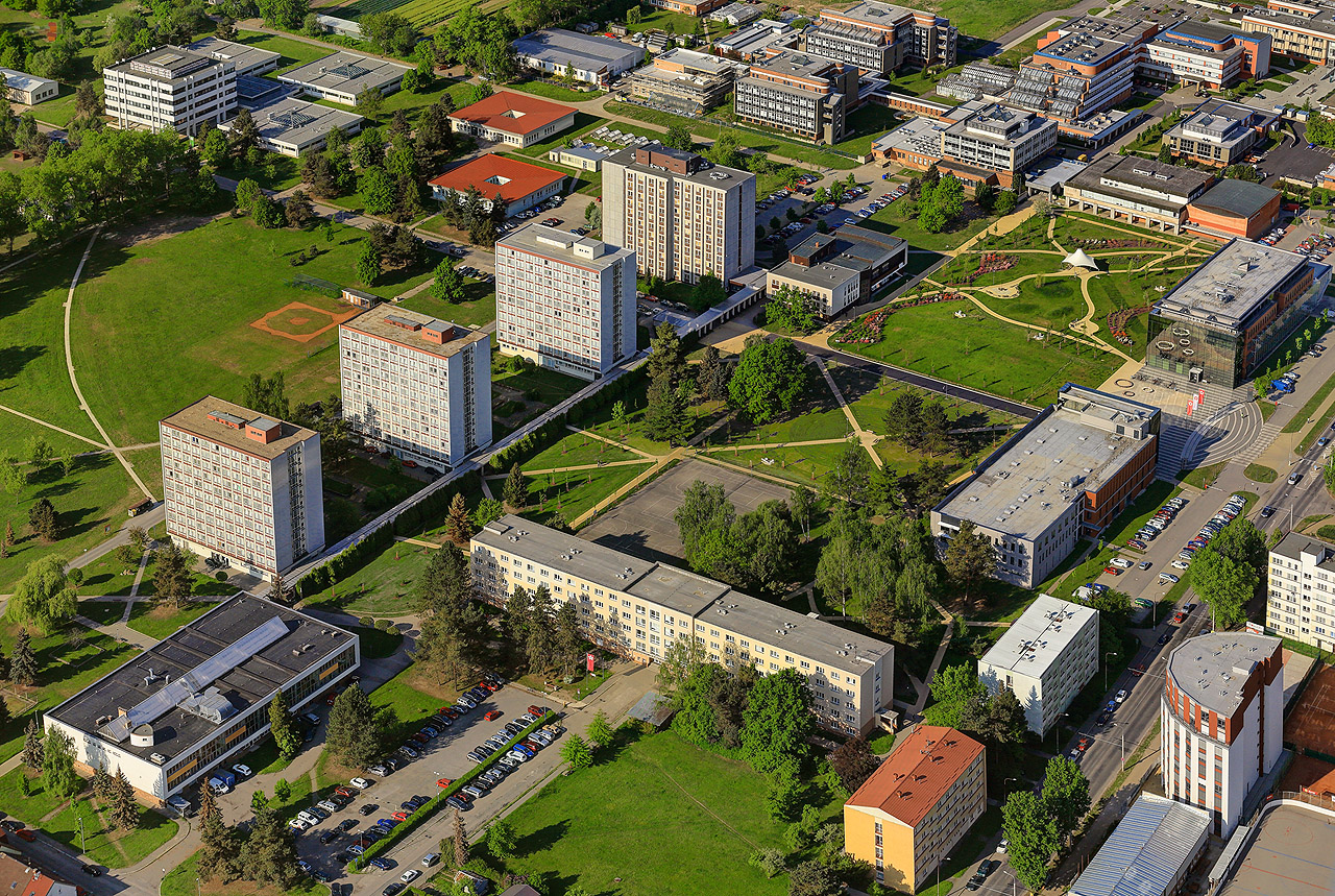 Letecký pohled na kampus Jihočeské univerzity ve Čtyřech Dvorech, foto Libor Sváček